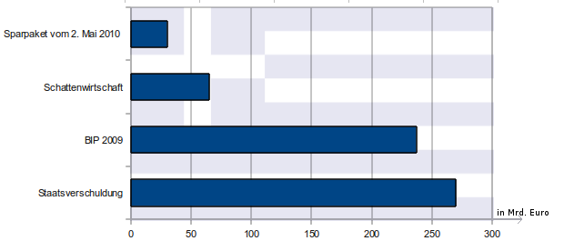 Veranschaulichung des Sparpakets vom 2. Mai 2010, der Schattenwirtschaft in Griechenland, des BIP 2009 und der griechischen Staatsverschuldung in einem Balkendiagramm. Daten aus Griechische Finanzkrise 2009/10 und Griechischer Staatshaushalt